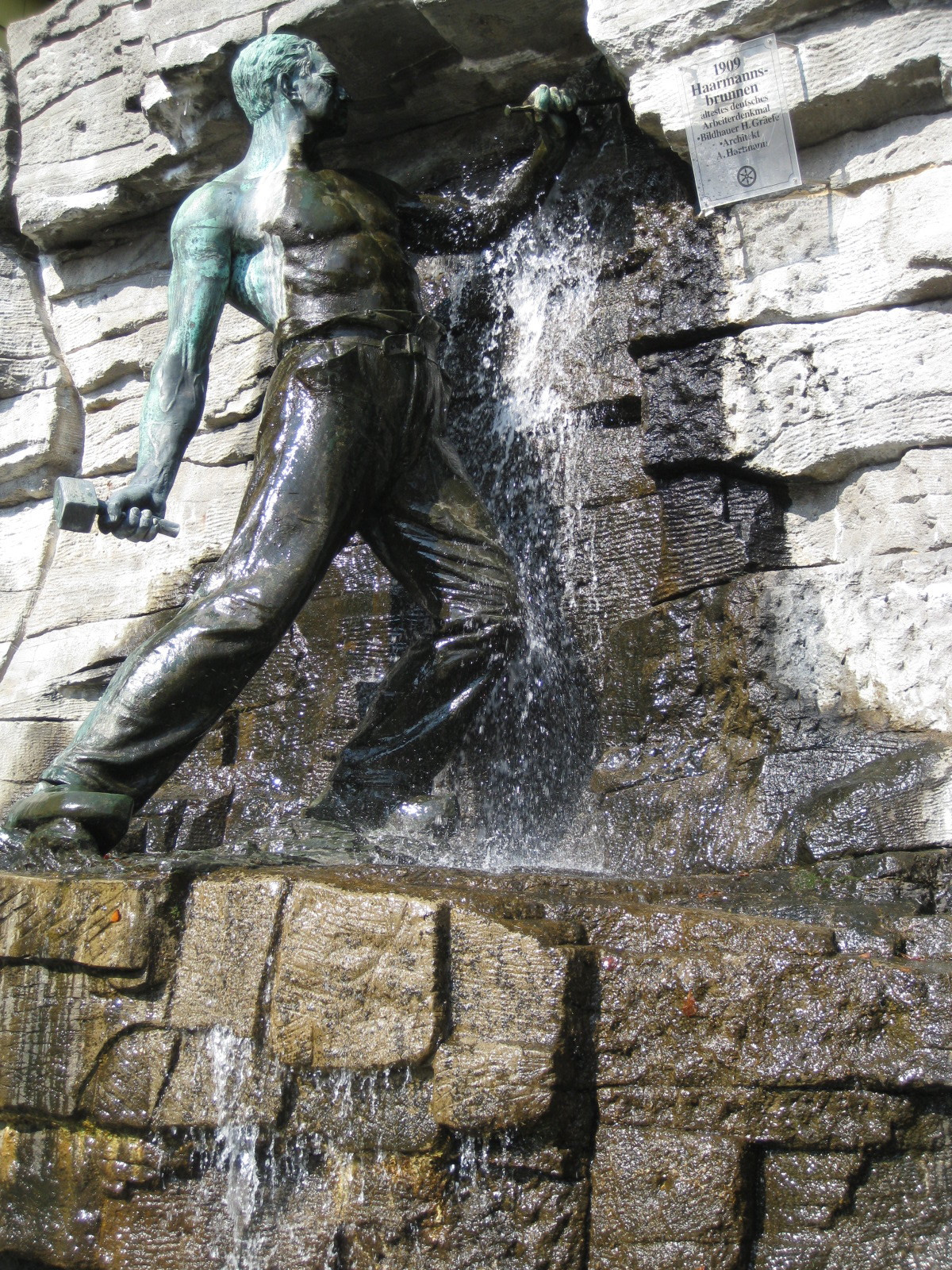 Bergmannsskulptur des Haarmannsbrunnens in Osnabrück